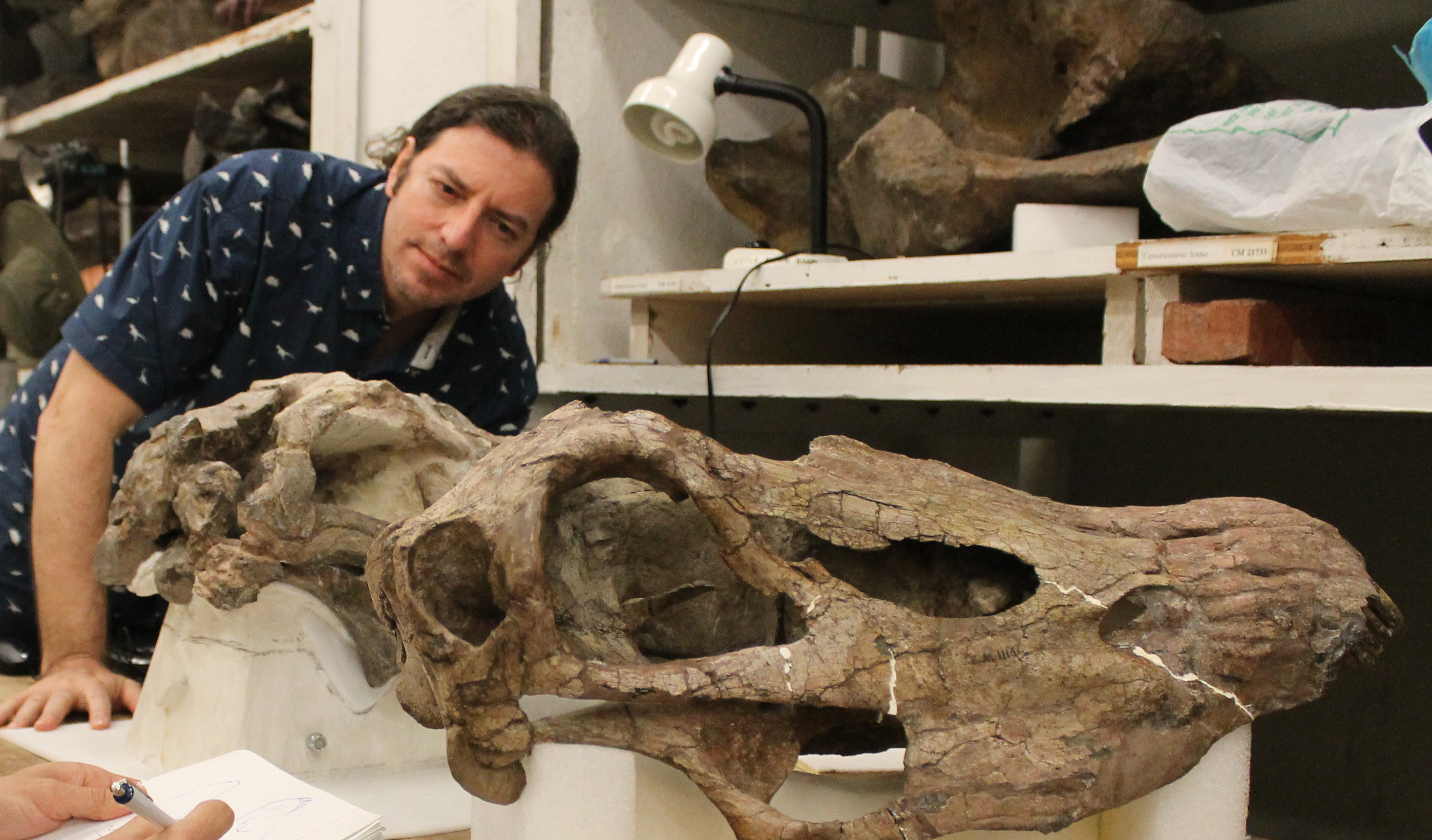 el paleontologo Gonzalez Riga estudiando un craneo